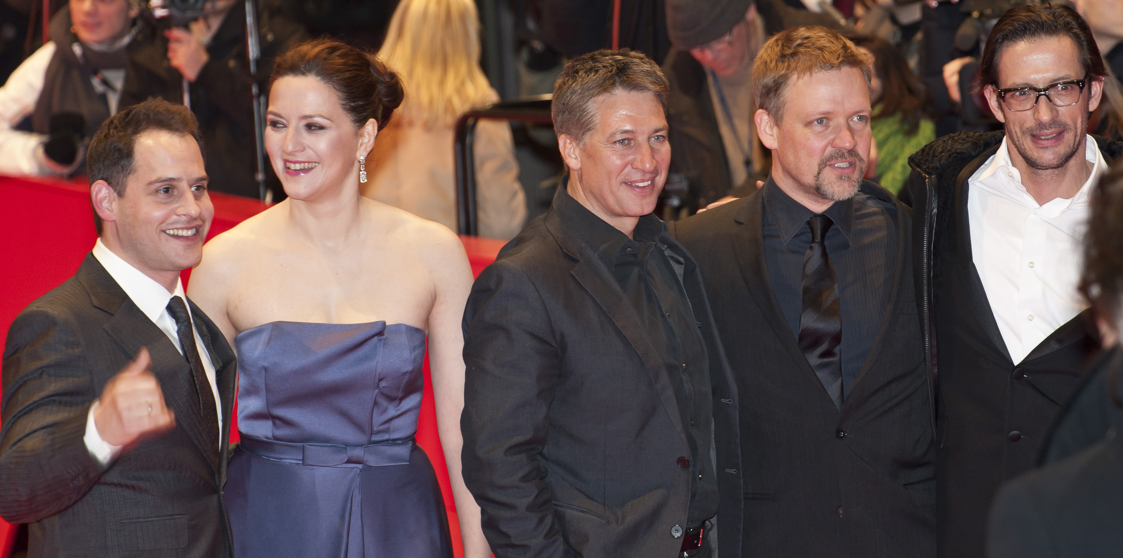 L-R: Moritz Bleibtreu, Martina Gedeck, Tobias Moretti, Justus von Dohnányi, Oskar Röhler (dir), premiere of the film "Jud Süß - Film ohne Gewissen" at the Berlinale Palast